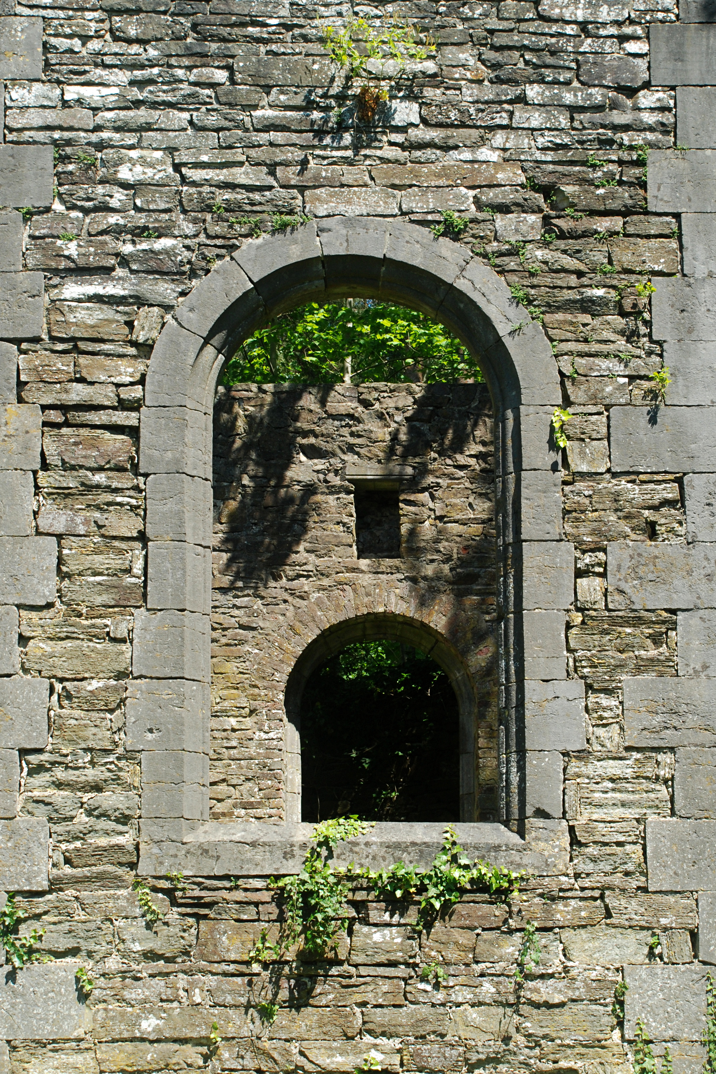 Belgique - Brabant wallon - Villers-la-Ville - Chapelle Notre-Dame de Montaigu